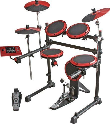 Elementaarne elektrooniline trummikomplekt